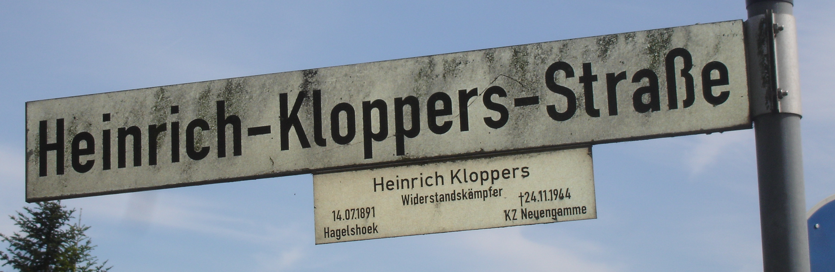 Beispiel eines Straßenschild